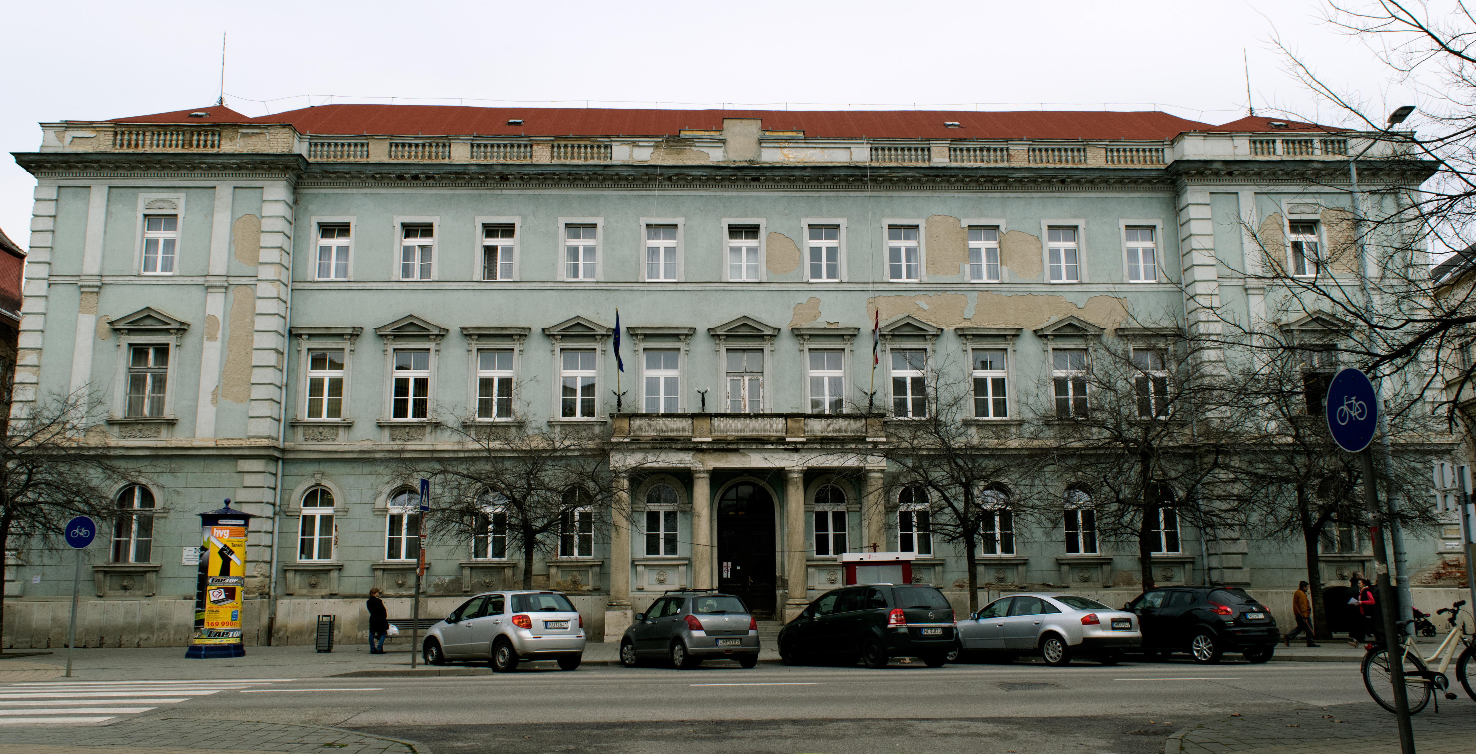 Jász-Nagykun-Szolnok Megyei Büntetés-végrehajtási Intézet